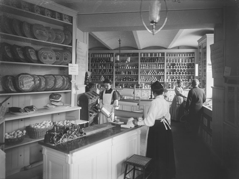 Svenska Hems speceributik på Karlbergsvägen 16